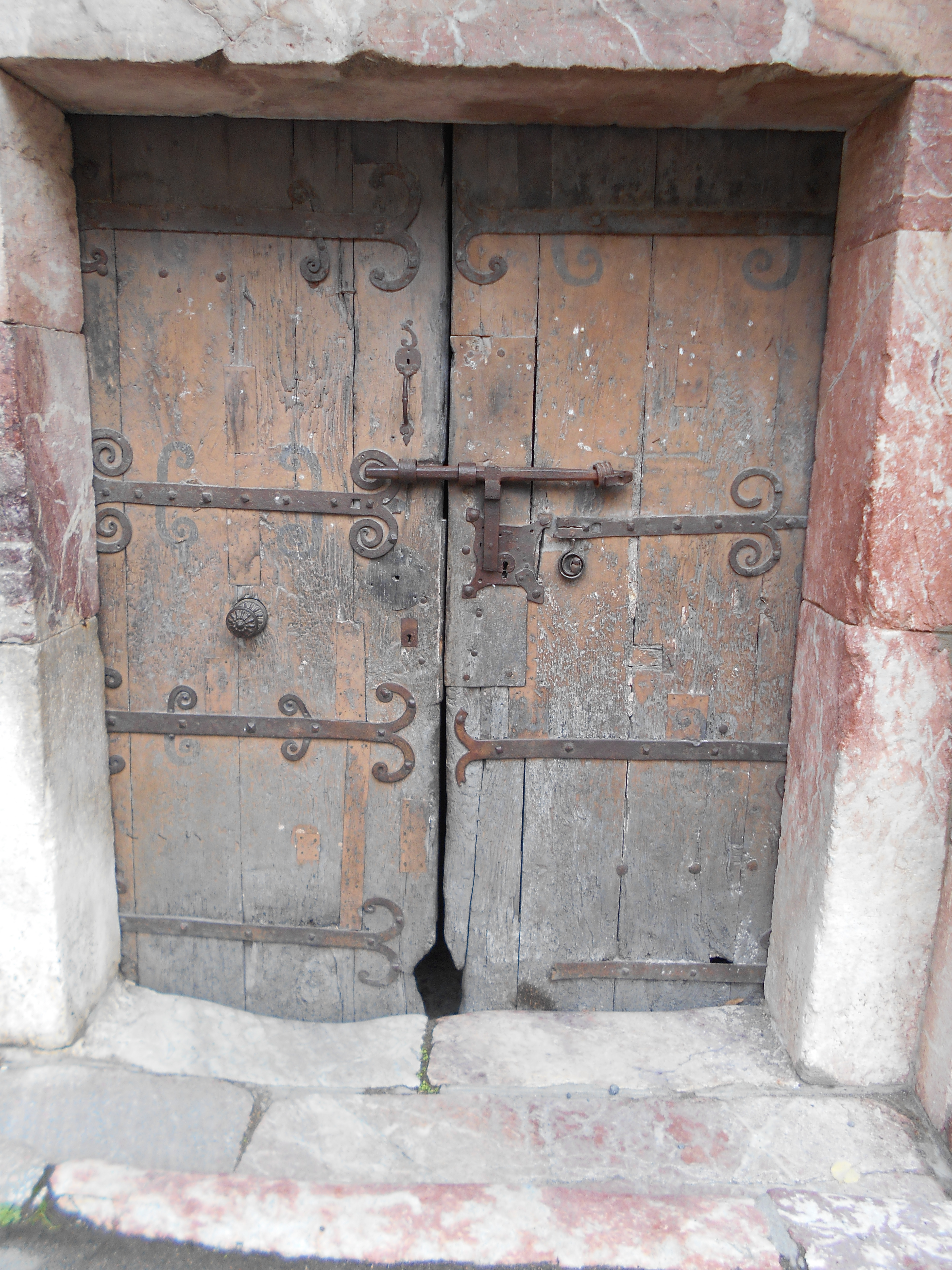 Ferramenta romànica de les portes de Sant Jaume de Vilafranca de Conflent-Porta occidental, gran